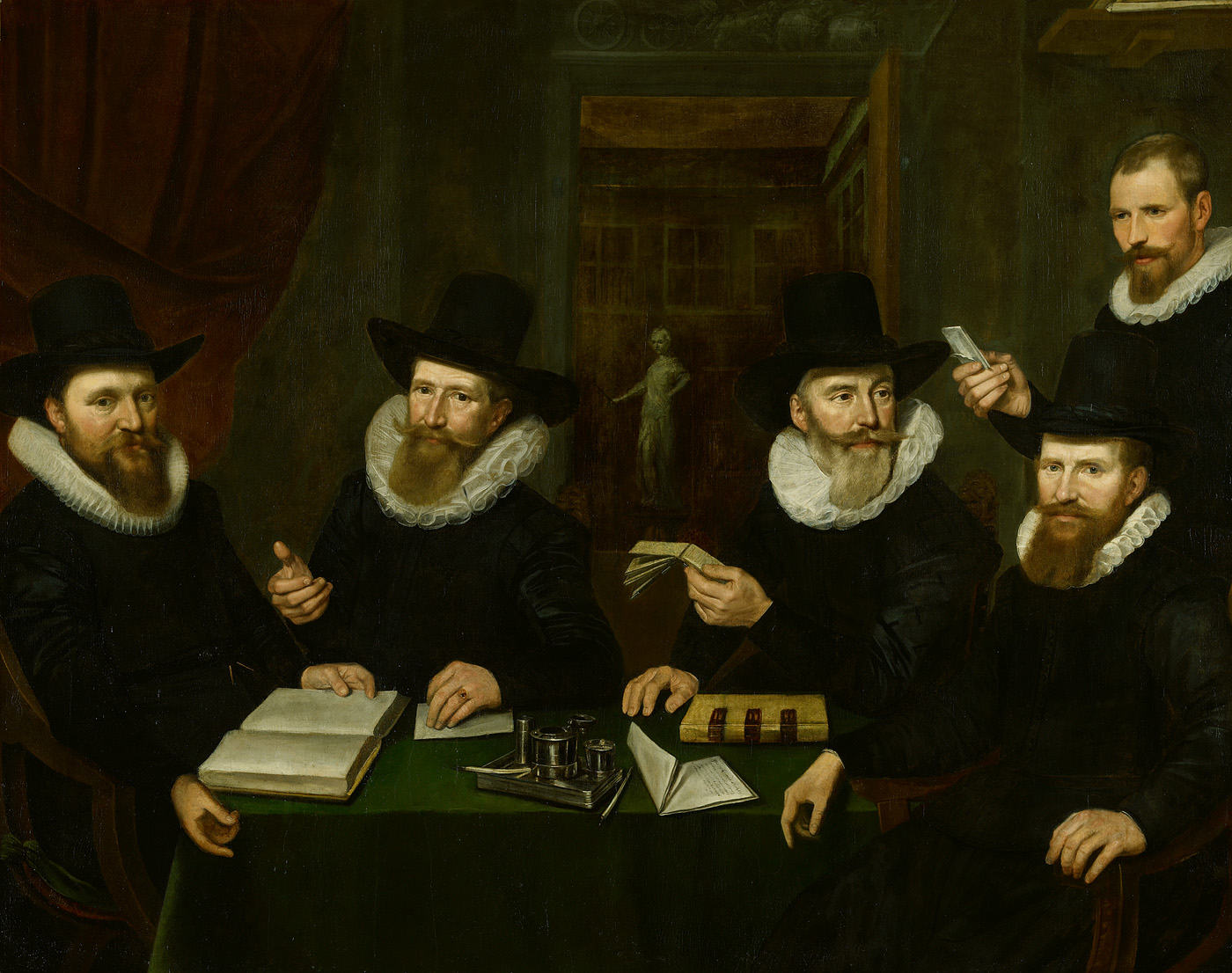 schilderij; criminaliteit; Rasphuis; regentenstuk; portret; groepsportret; Rasphuis